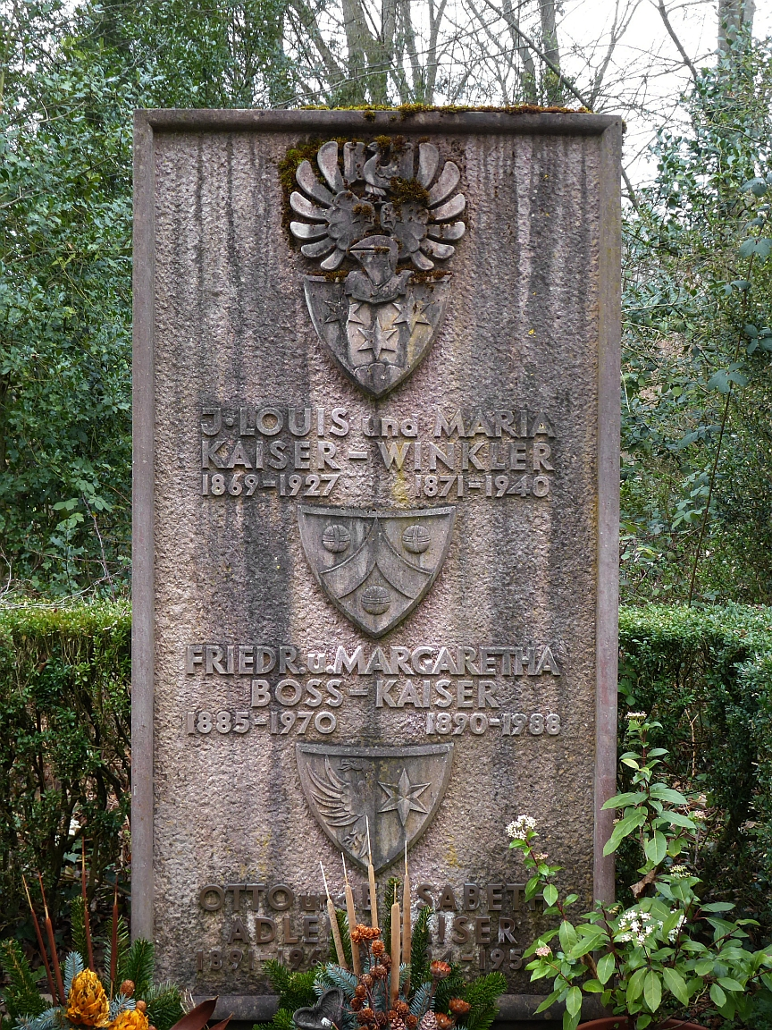 J.Louis Kaiser-Winkler (1869–1927), Schweizerische Kostüm- und Fahnenfabrik J. Louis Kaiser, Familiengrab auf dem Friedhof Hörnli, Riehen, Basel-Stadt